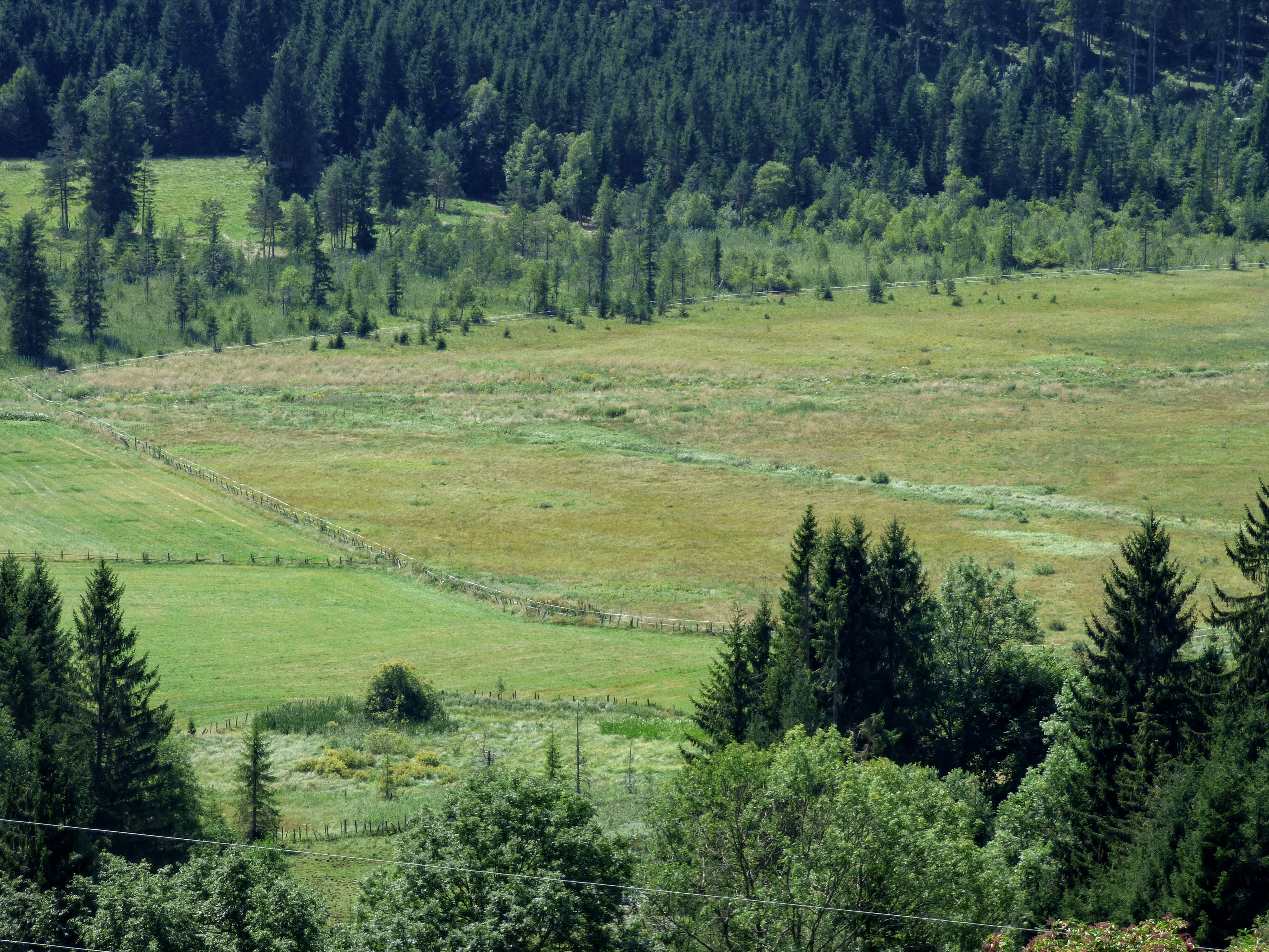 Freundsamer Moos (Dobra Moor), Moor in den Kärntner Gemeinden St. Urban und Liebenfels